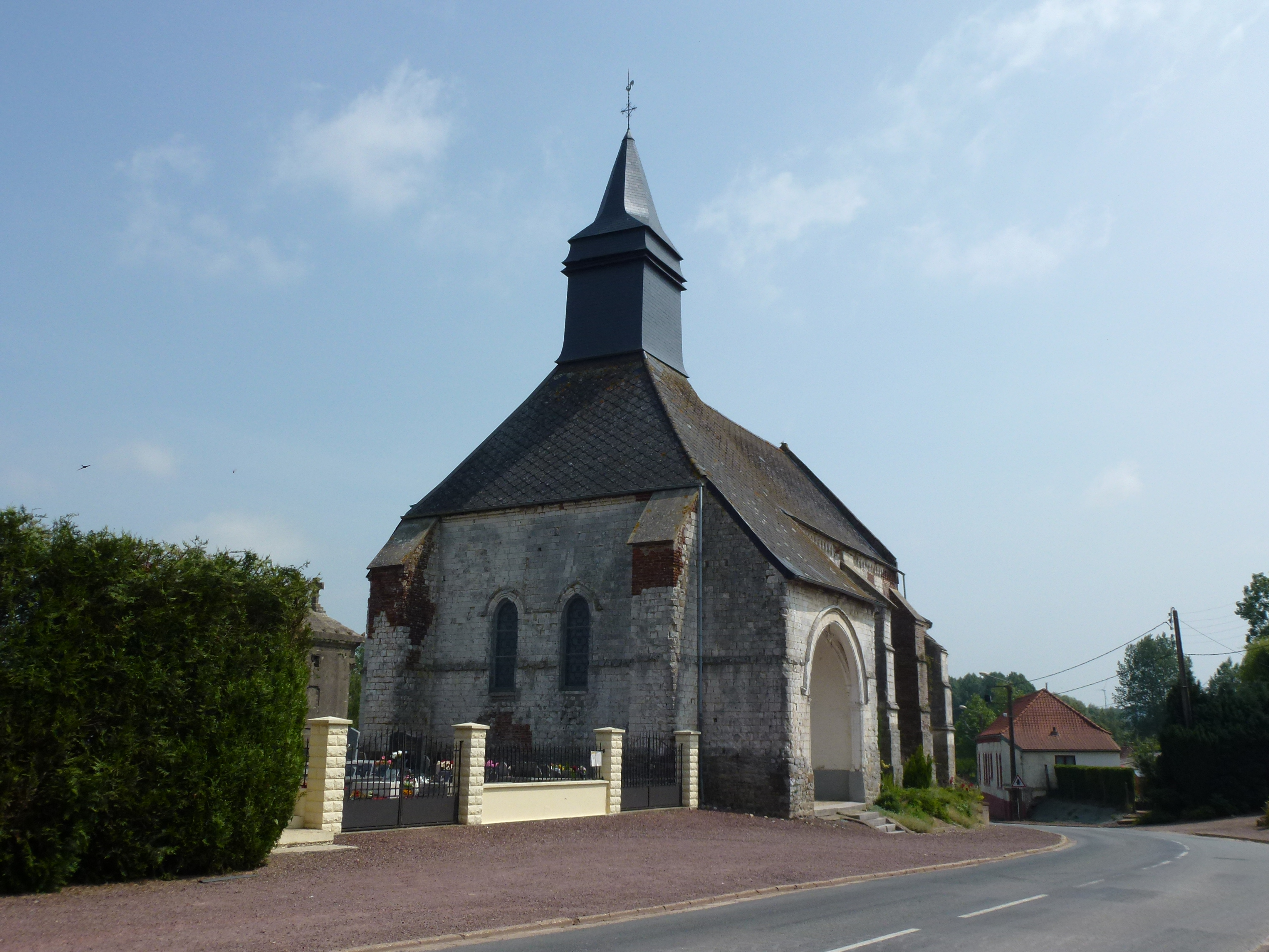 Senlis (Pas-de-Calais, Fr) église Notre- Dame PA00108430 façade .